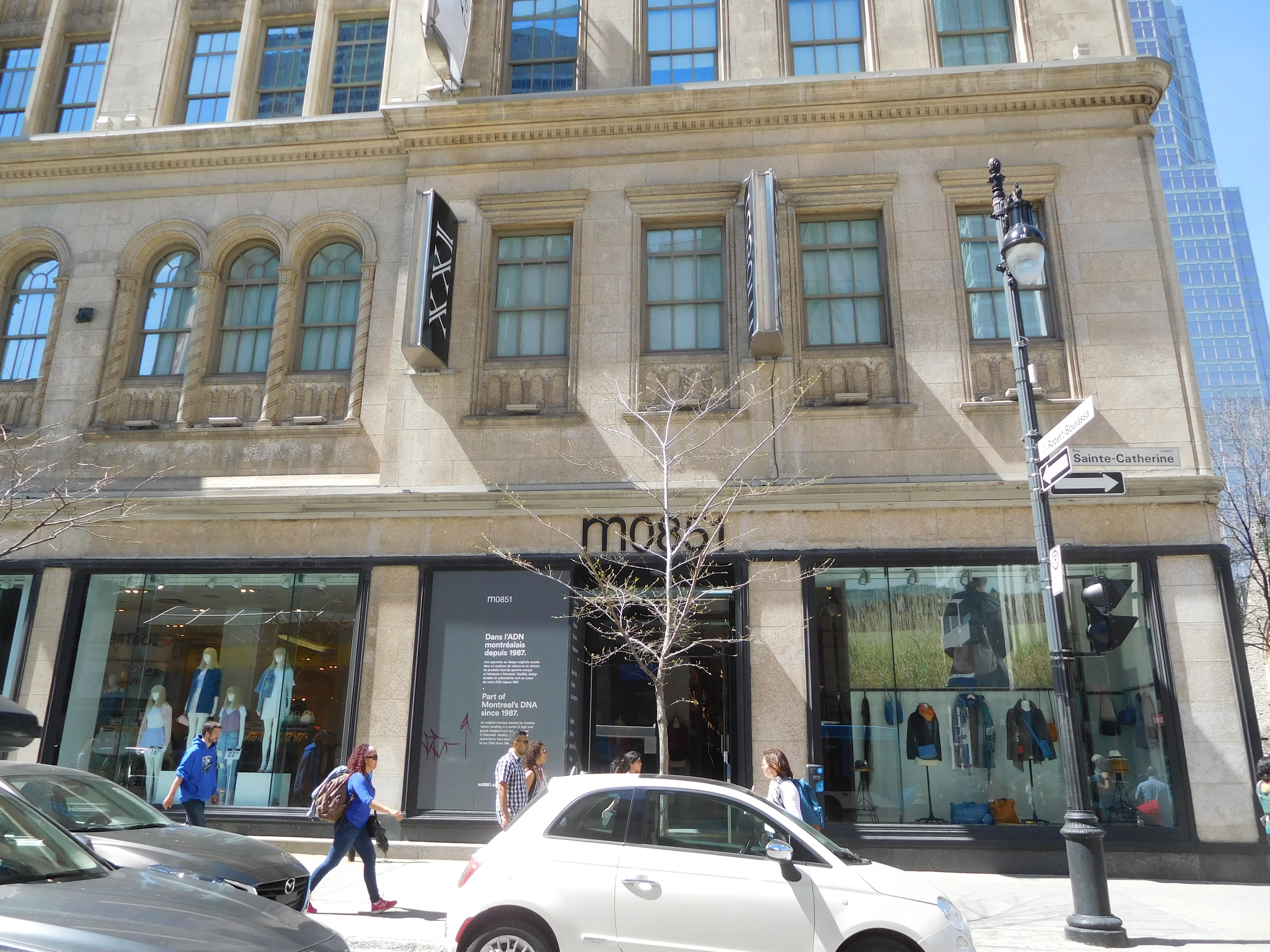 M0851, sacs et vêtements, 677, rue Sainte-Catherine Ouest, Montréal